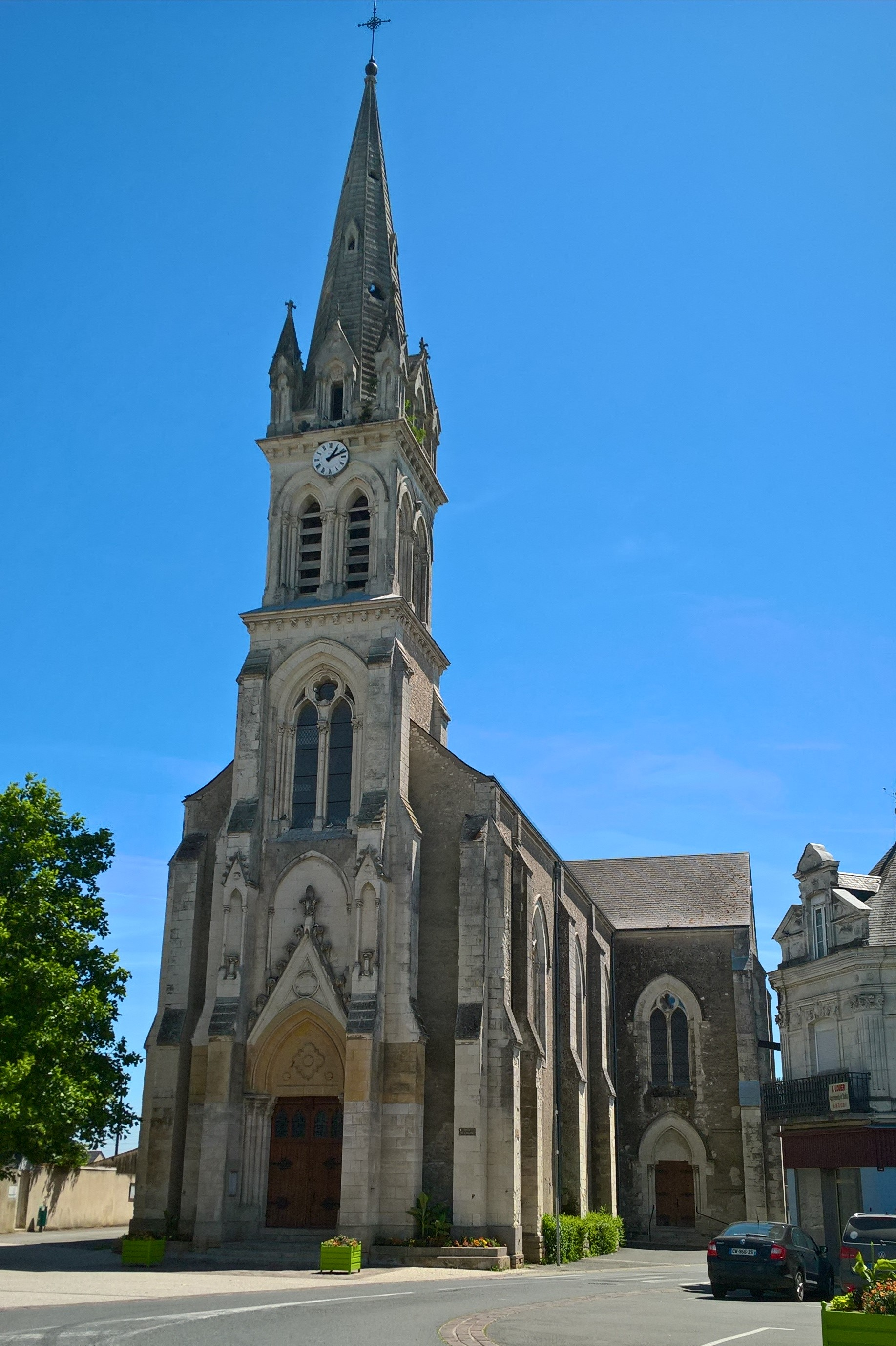 Noyant, église